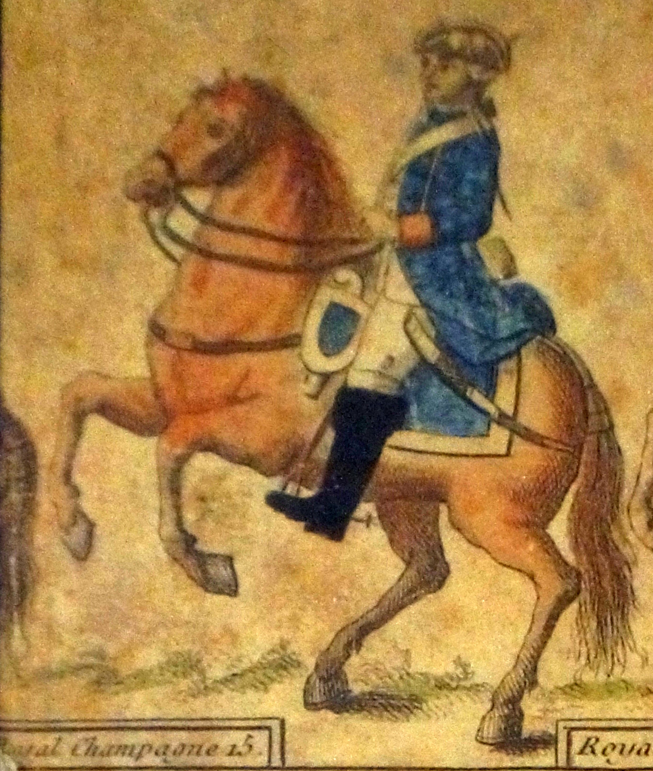 Présenté au Musée de l'Armée.